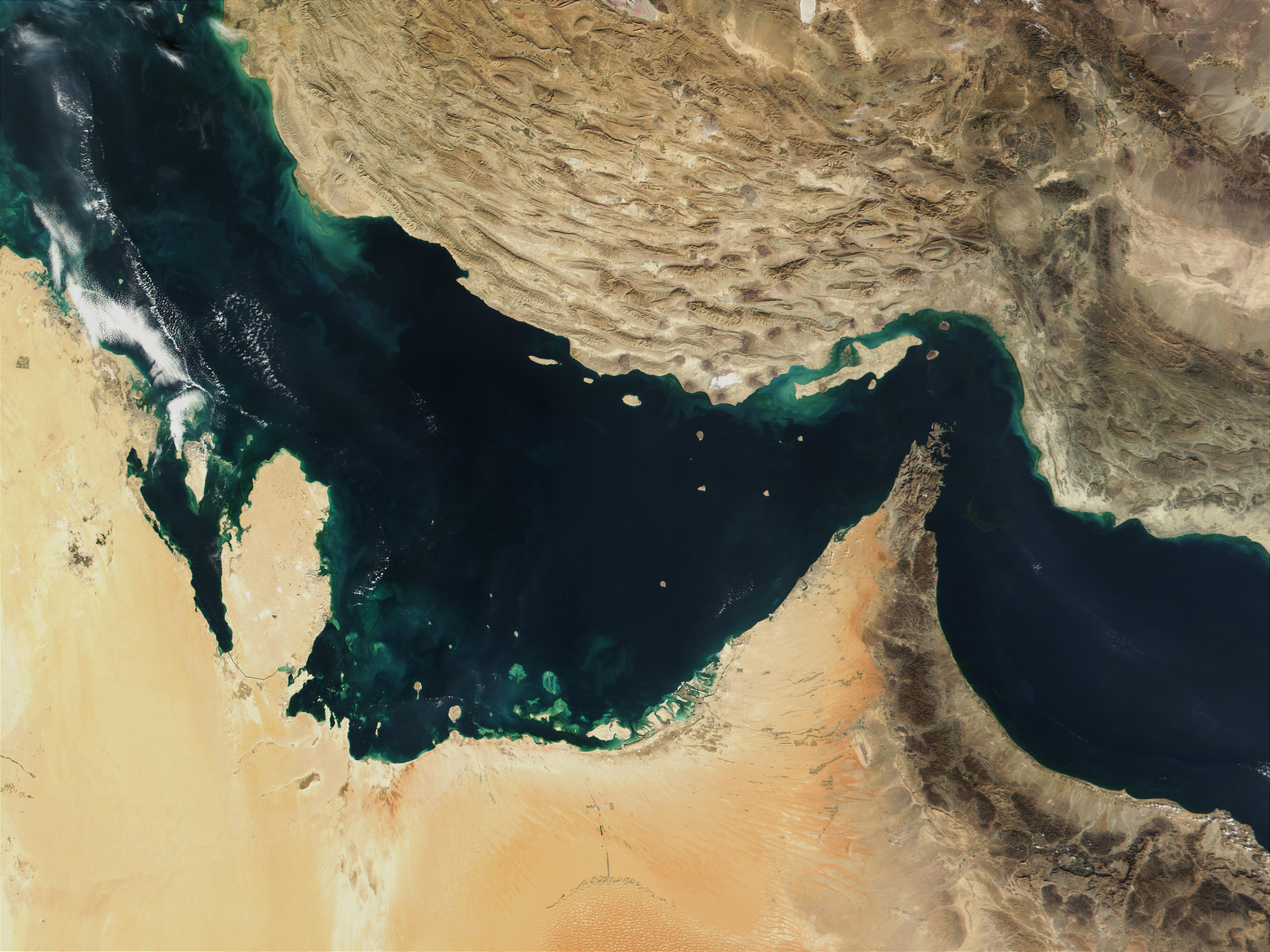 Satellite afbeelding van de Perzische Golf van Terra / MODIS.